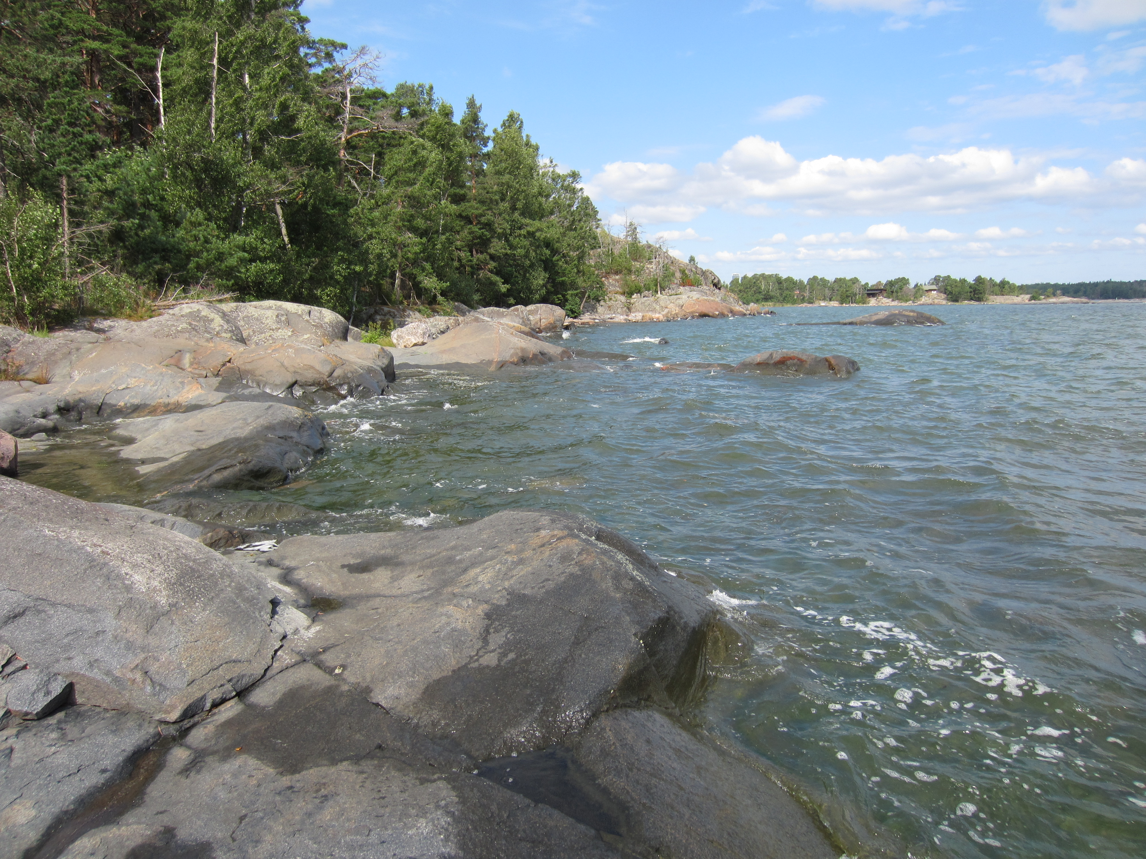 Helsinki, Ausflug mit Kanu zur Insel Kalliosaari